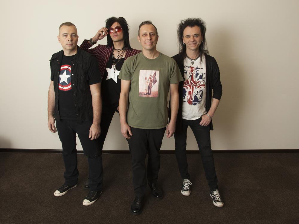 Николай Богданов, Дмитрий Хакимов, Александр Иванов, Валерий Аркадин